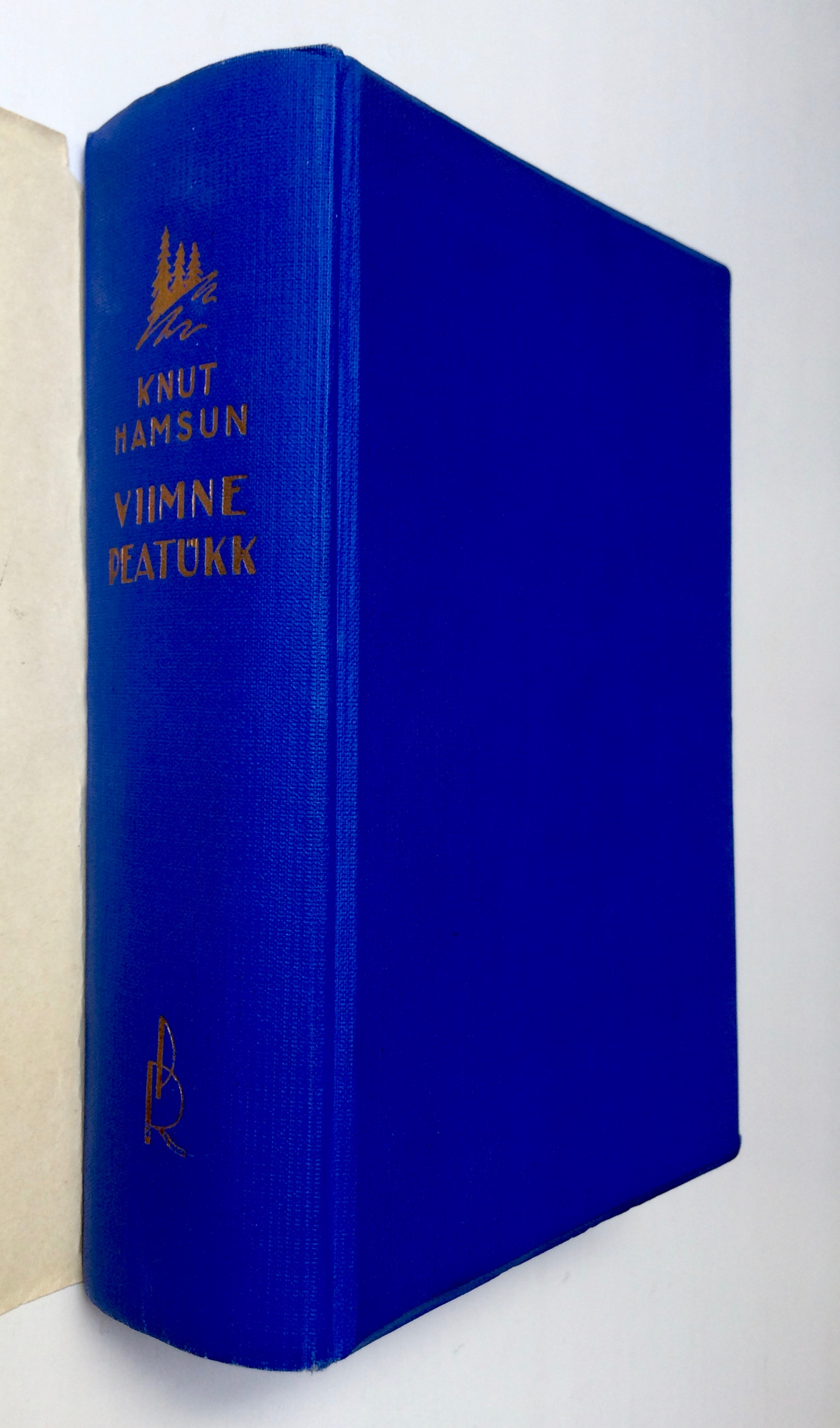 Sinine kalingurköide